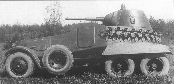 БА-11 вид сбоку